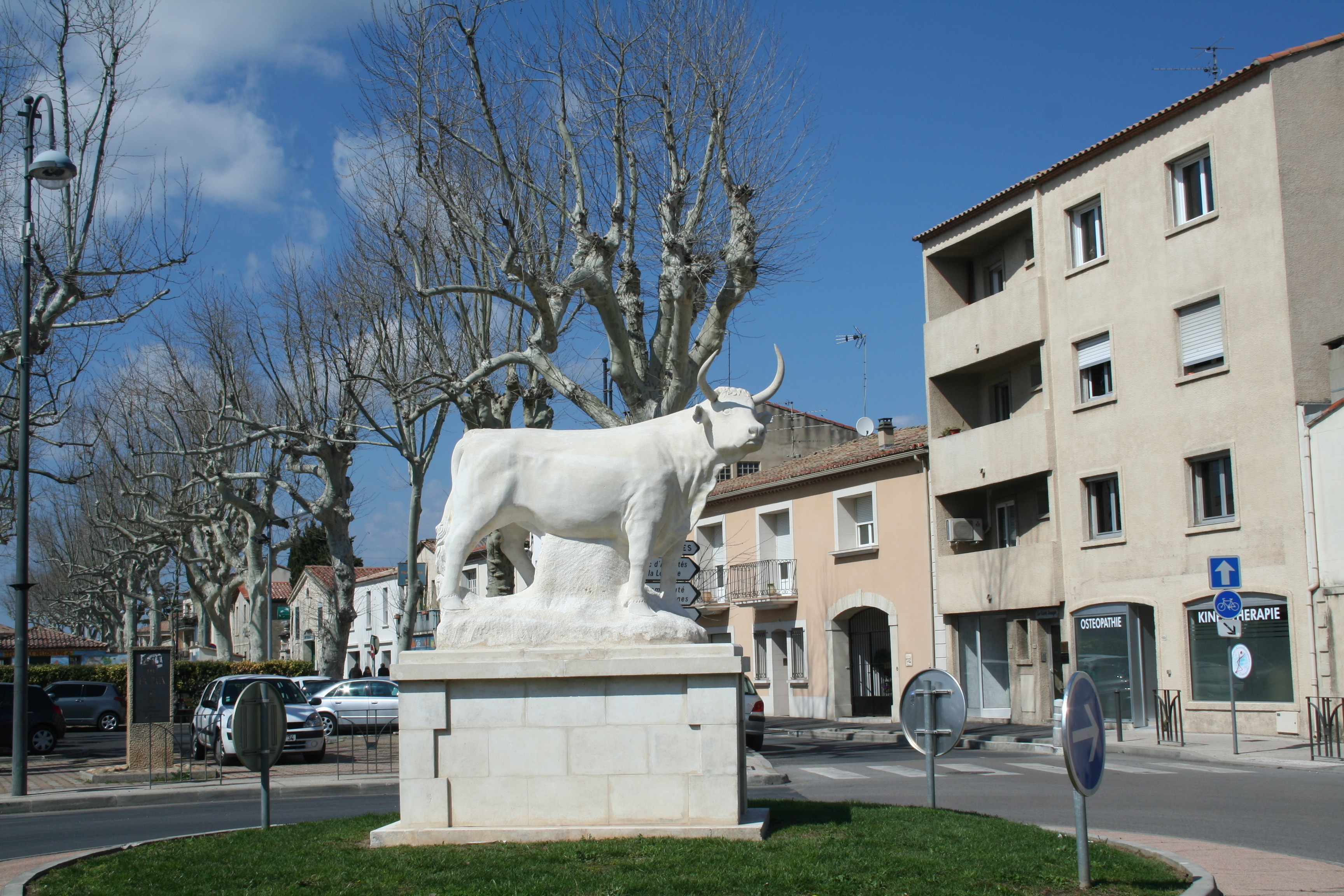 Mauguio (Hérault) - statue à la gloire du cocardier Muscadet, biou d'or, de la manade Rouquette, 1998.